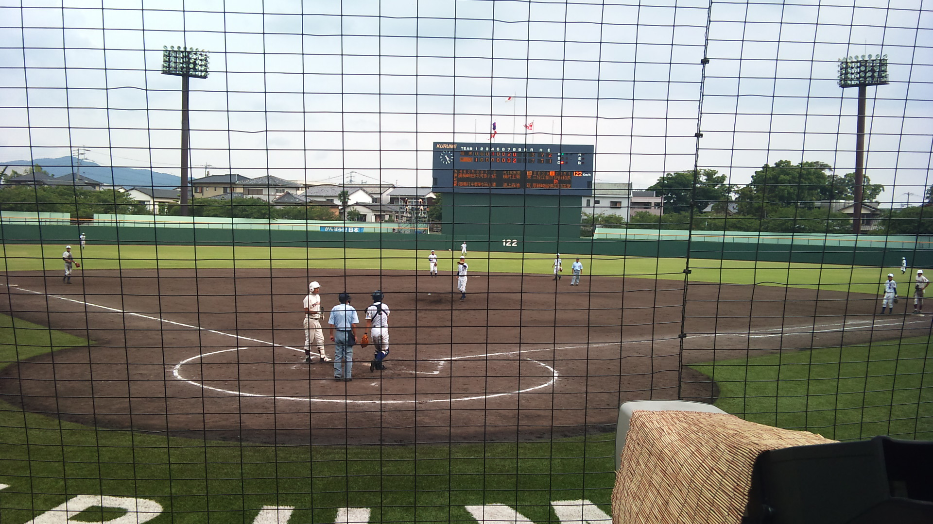 バックネット裏より